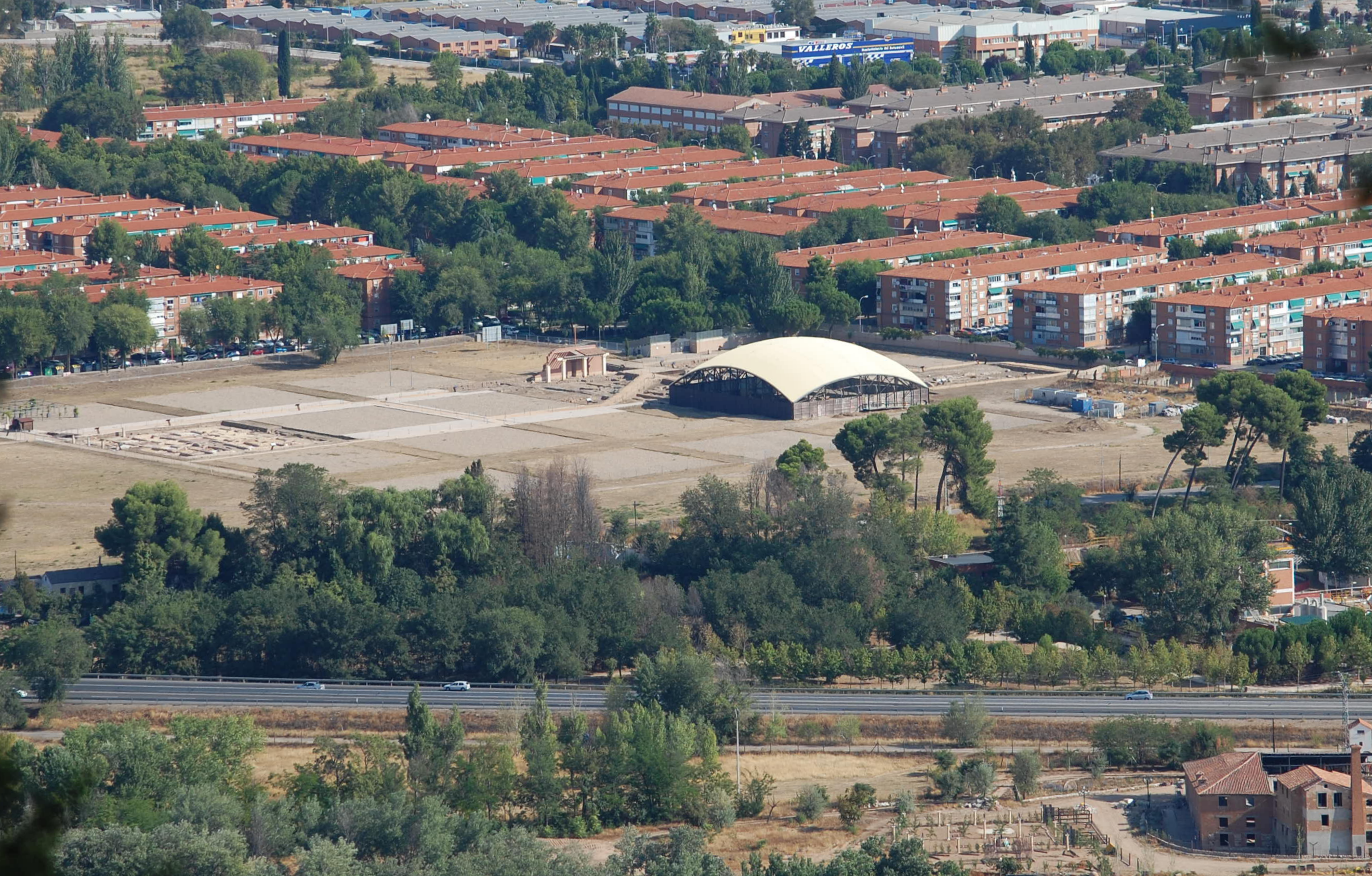 Vista panorámica de la Ciudad Romana de Complutum. Yacimiento arqueológico ubicado en Alcalá de Henares (Comunidad de Madrid - España).